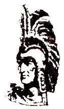 Imagen del Emperador Cuauhtemoc utilizada como Logo por la Cerveceria Cuauhtemoc hasta el año de 1993.